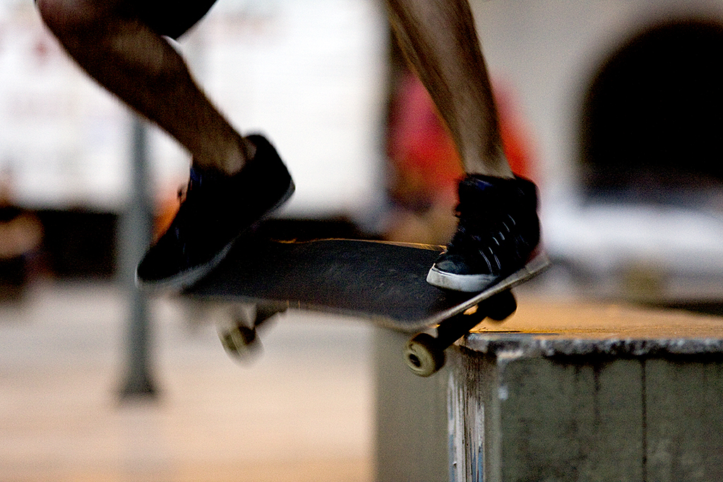 "CROOCKED GRIND" - Praça XV